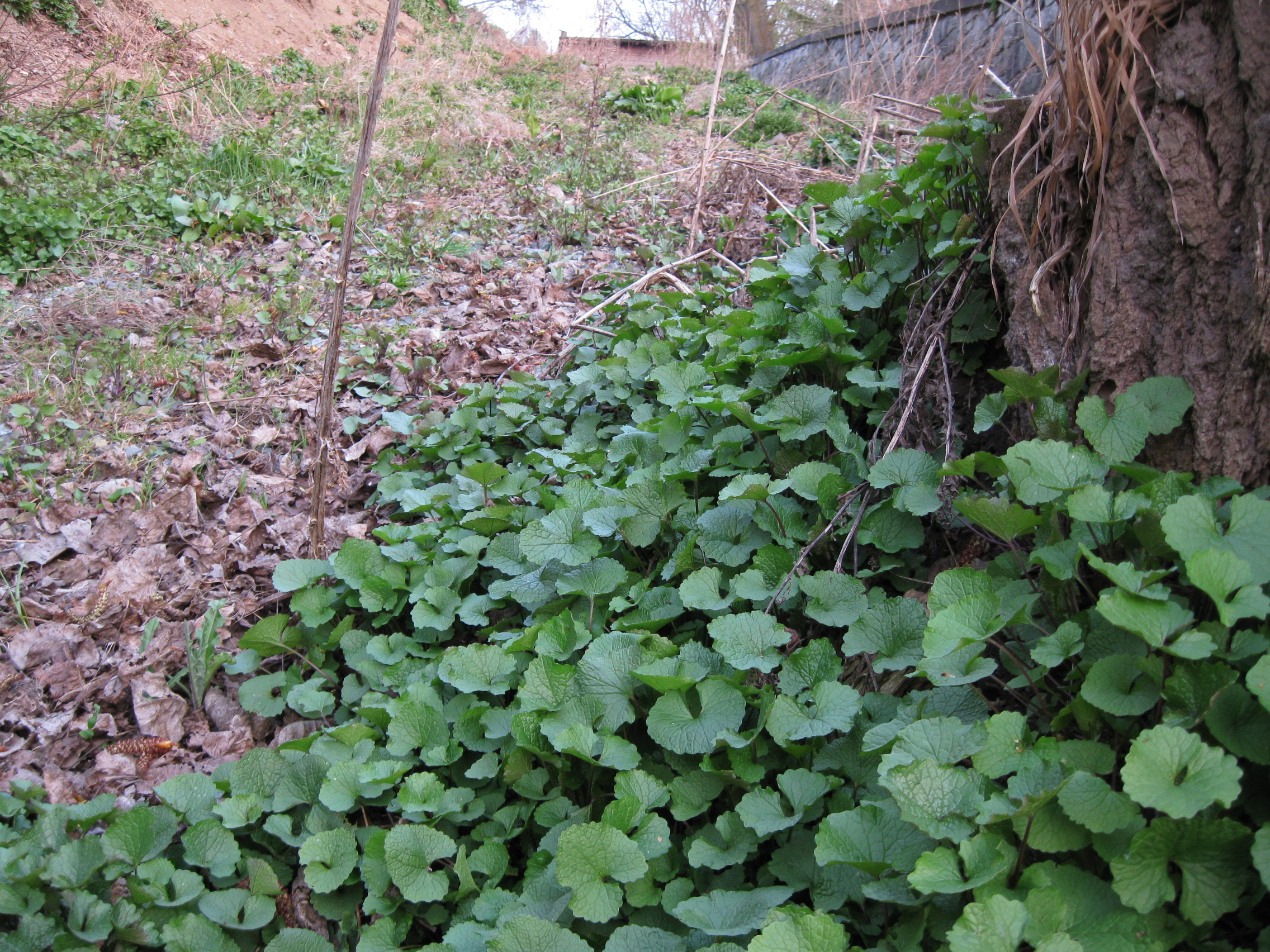 Triebe der Knoblauchsrauke, vor der Blüte, im Monat April